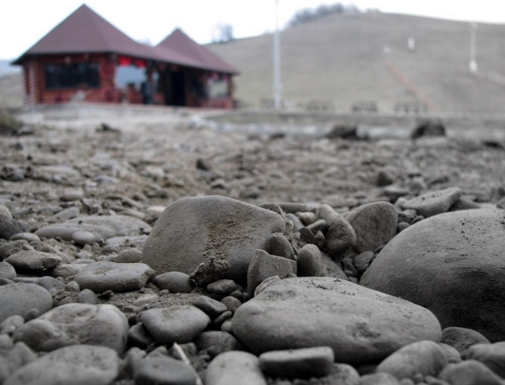 Această fotografie este realizată la pârtia din Viișoara; unde este și capătul drumului mijloacelor de transport în comun ale Transurb Vaslui.